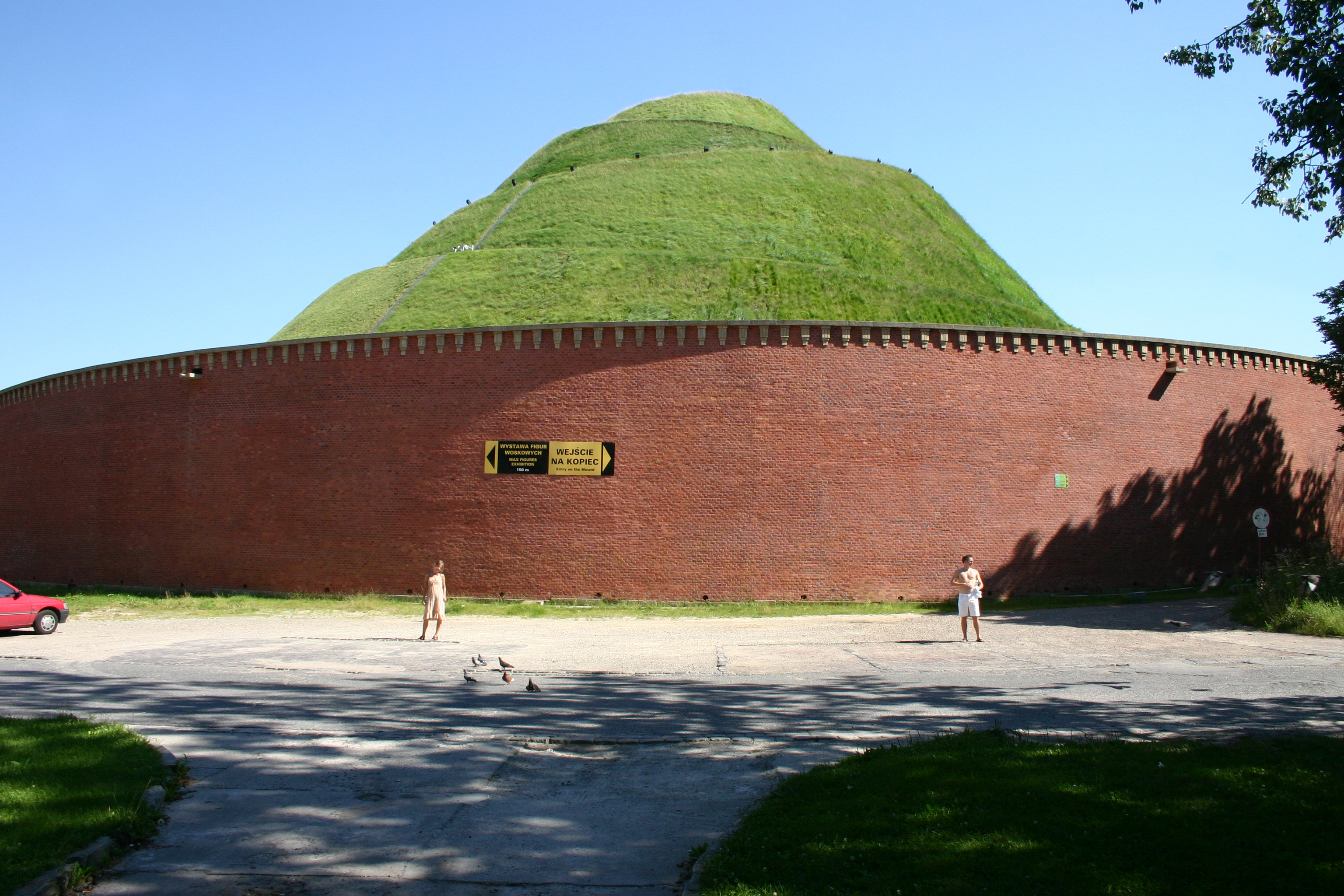 Kraków, Poland